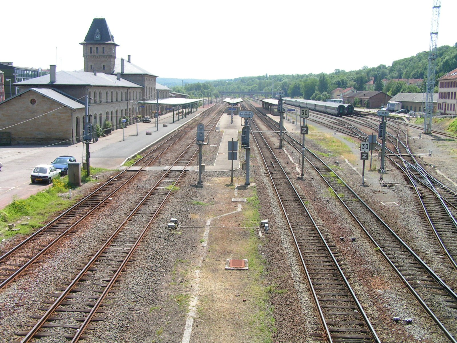 Sarrguemines - Gare